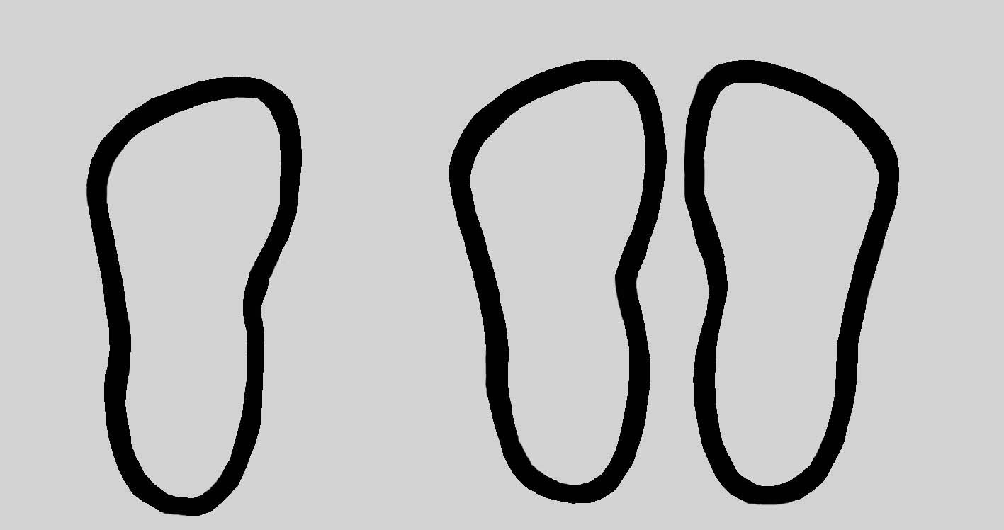 Typologie der podomorphen Petrosomatoglyphen auf Lanzarote nach Hans-Joachim Ulbrich